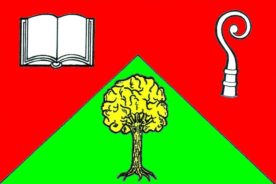 Vlajka obce Skryje v okrese Brno-venkov